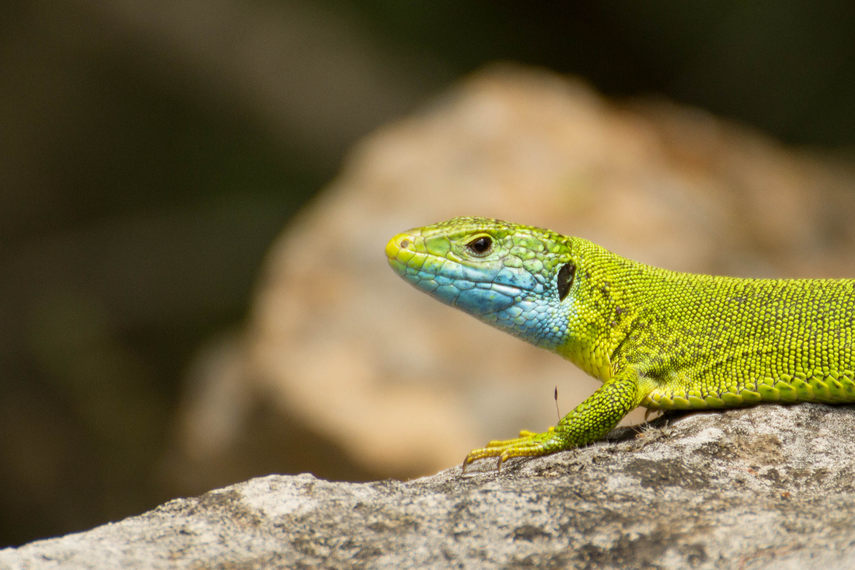 parco naturale delle Dolomiti Friulane (Q683241)